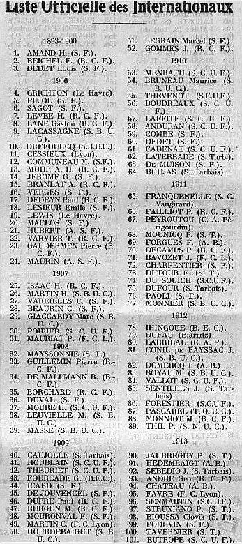 Liste officielle des internationaux de France de rugby à XV, jusqu'en 1913.